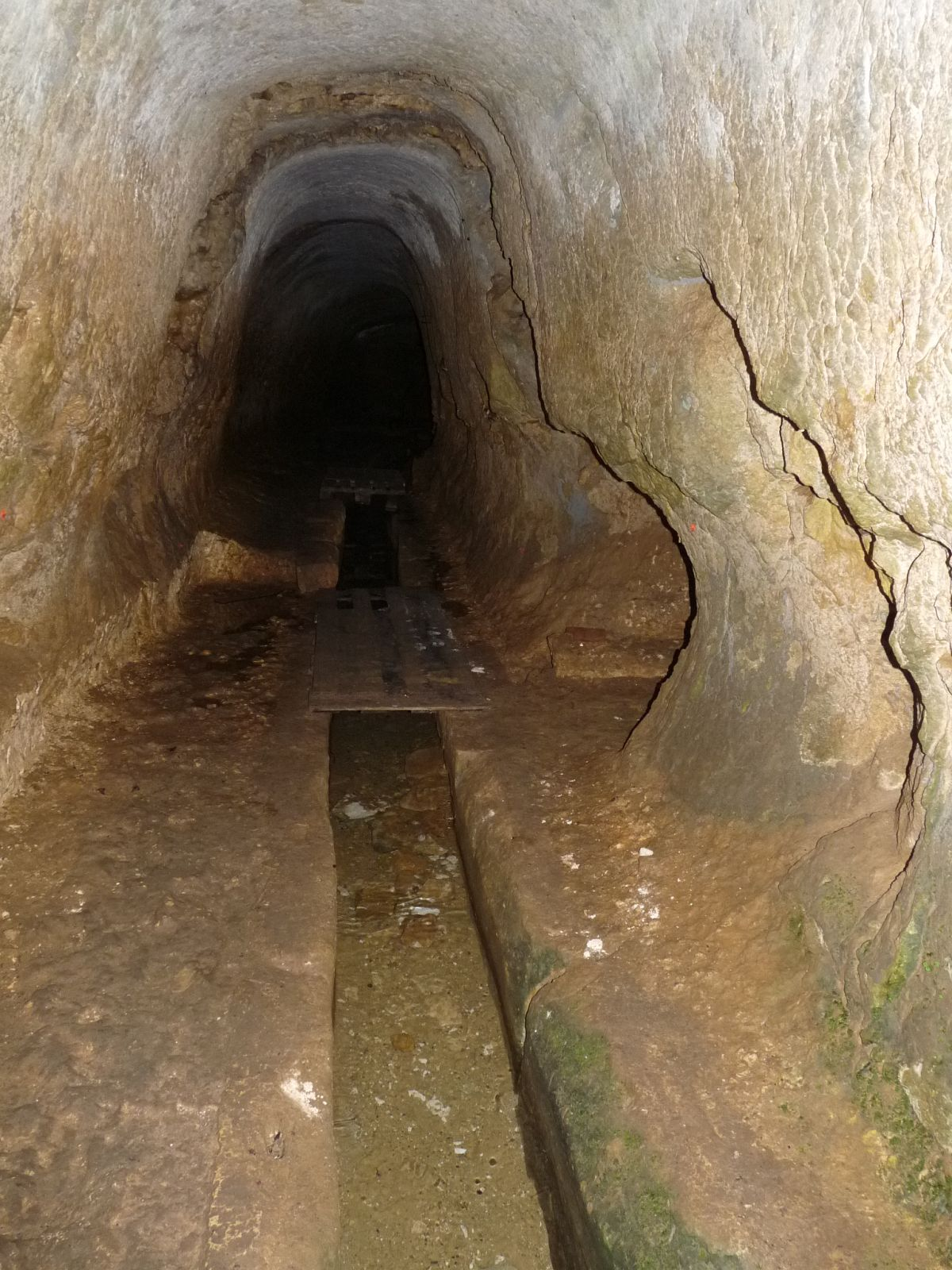 aqueduc romain du Douhet, Charente-Maritime, France